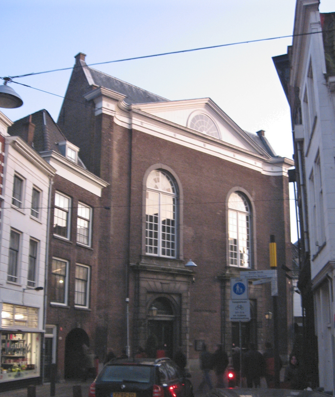 Augustijnenkerk